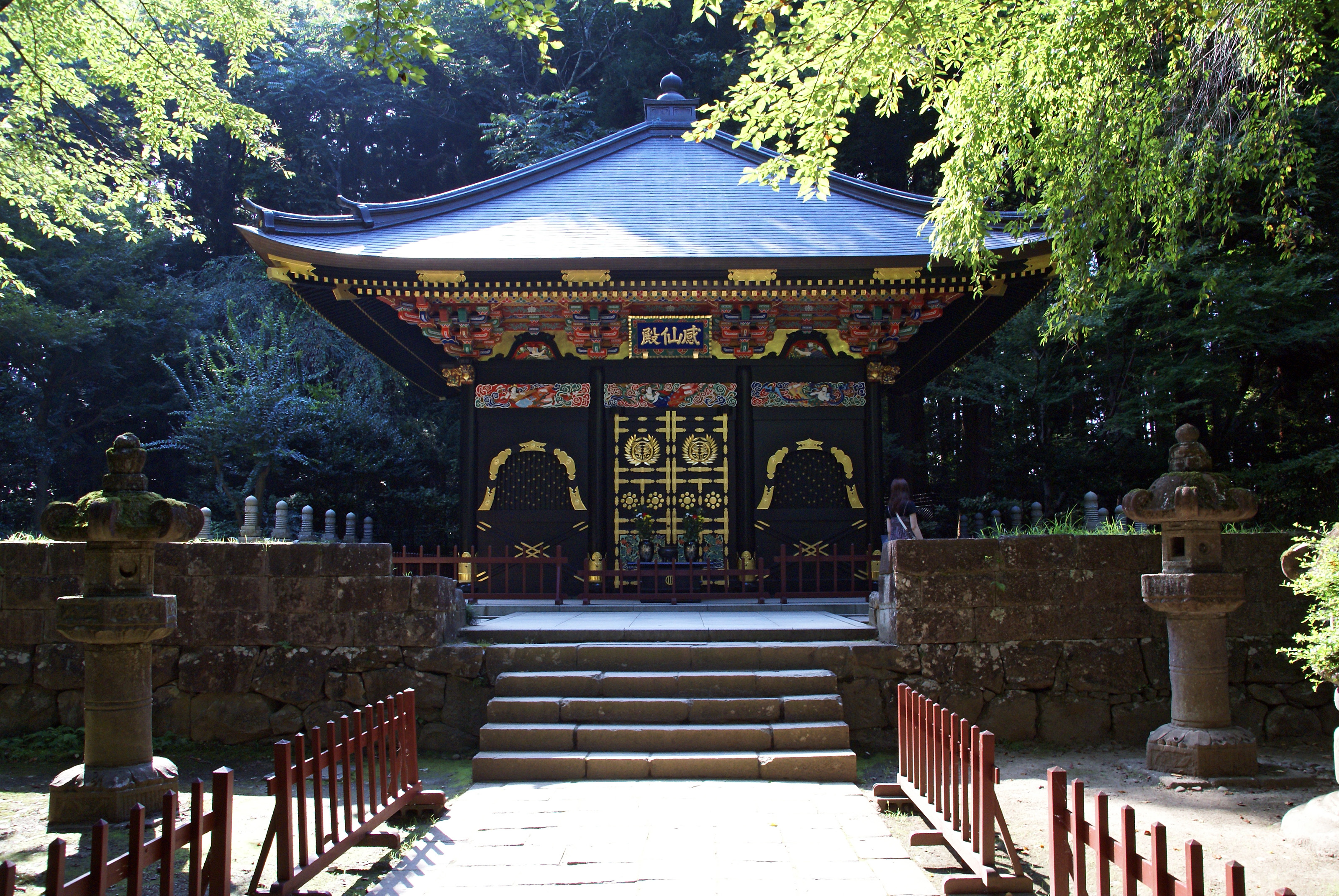 Zuiho-den in Sendai, Miyagi prefecture, Japan